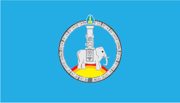 Flag of Bayankhongor Aymag, Mongolia